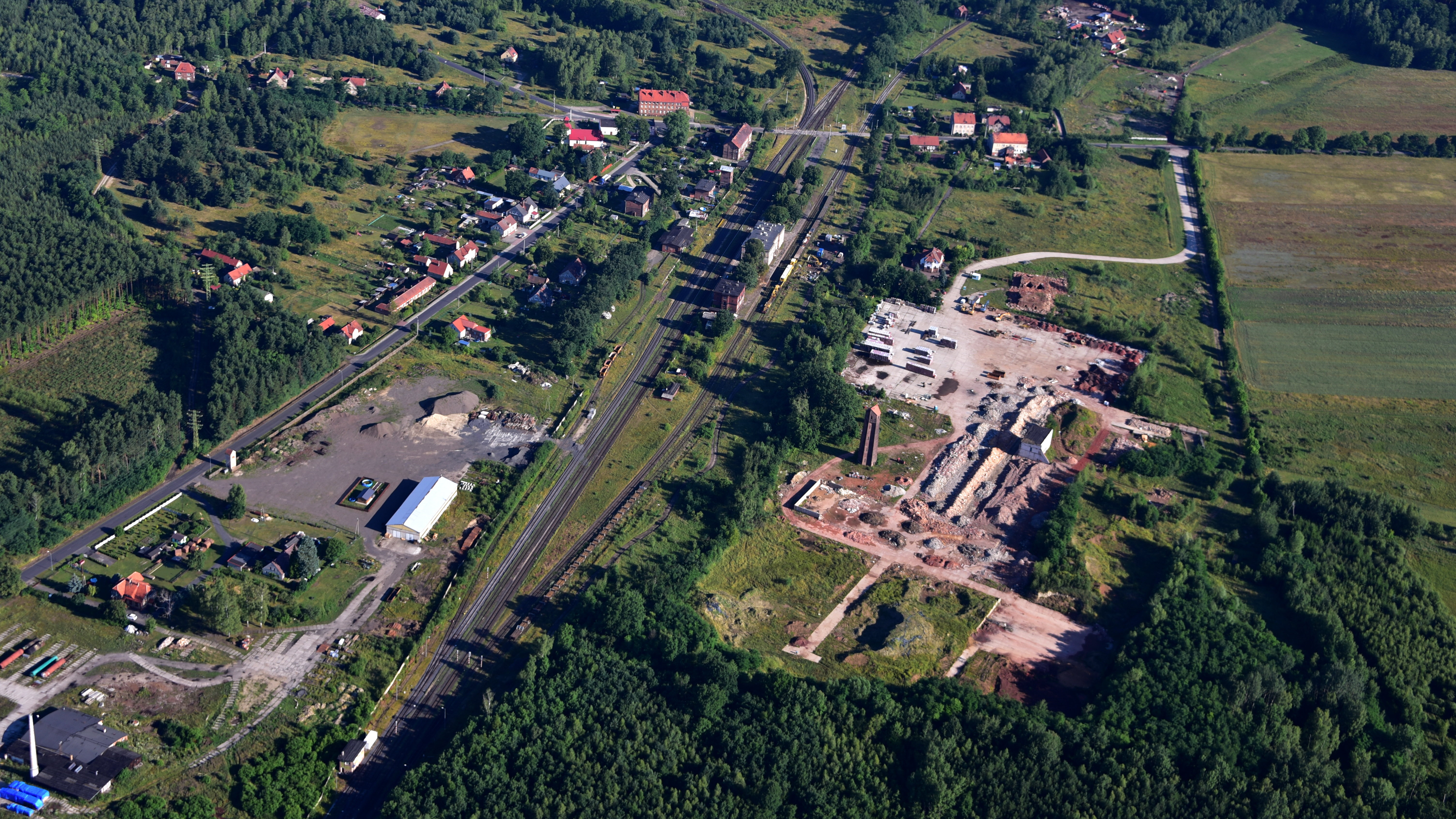 Jankowa Żagańska, Luftaufnahme (2017)